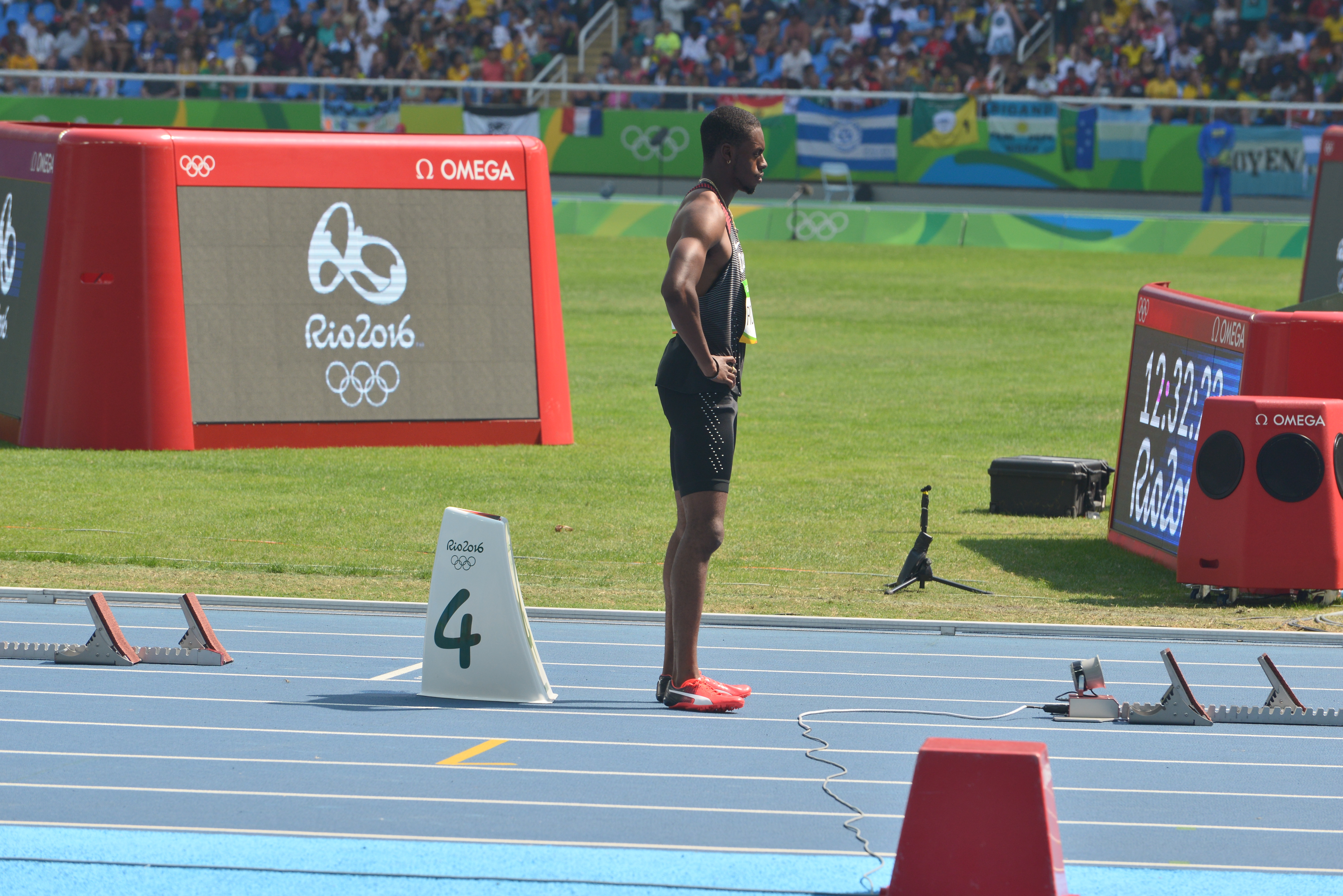 Séries du 200m Homme aux JO de Rio 2016